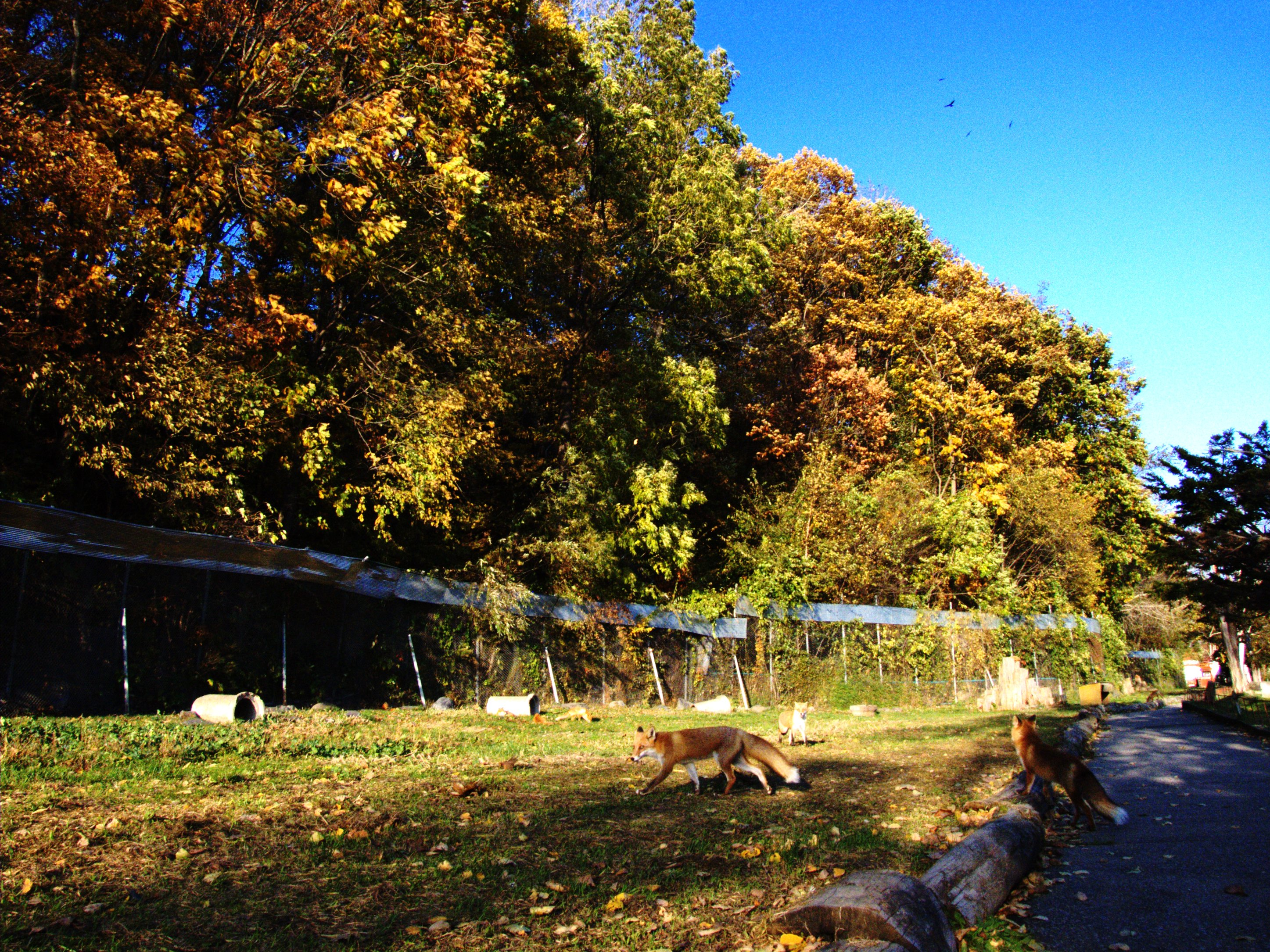 北きつね牧場。留辺蘂（るべしべ）、温根湯（おんね湯）温泉。北海道北見市。